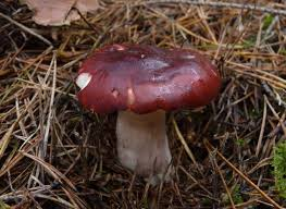 nejedlá a štiplavá holubinka